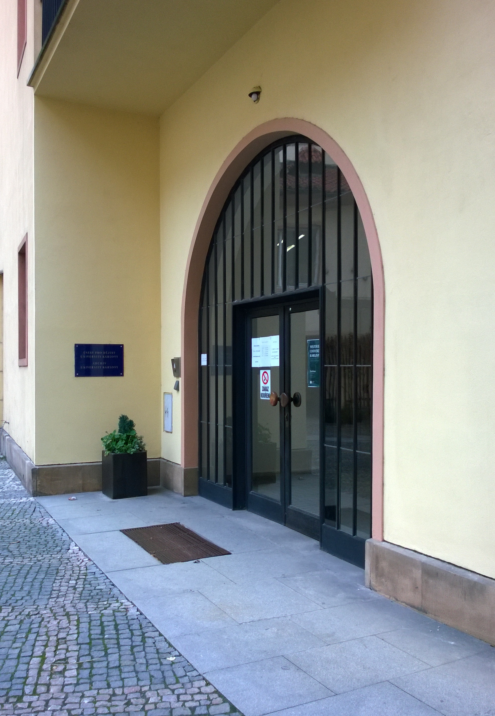 Vchod od Ústavu dějin Univerzity Karlovy a archiv Univerzity Karlovy (přístupné z Karolina z Ovocného trhu, nebo z Buquoyjského paláce z Celetné)